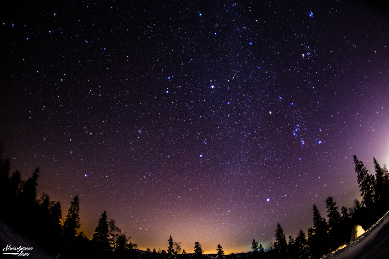 Таганайский природный комплекс, This image is related to the protected area of Russia number 7410002